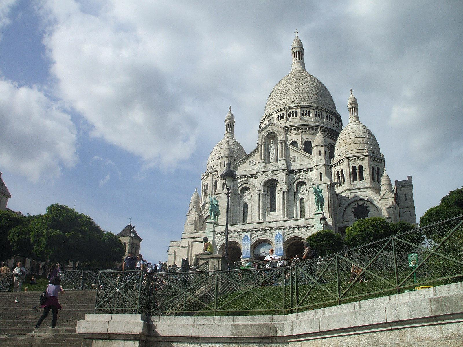 La Basílica del Sagrado Corazón de Montmartre Paris Francia